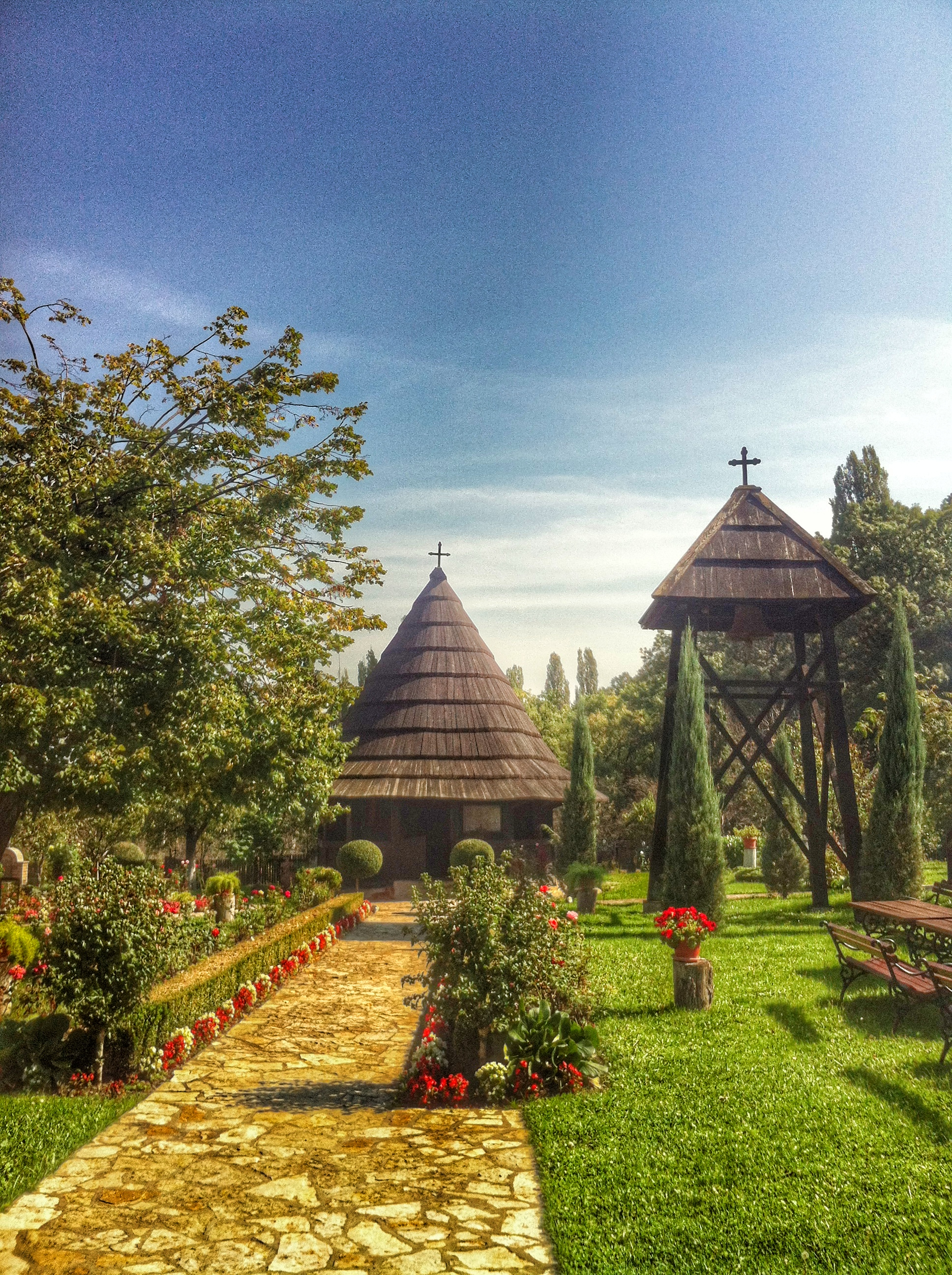 Српски (ћирилица): Црква је подигнута 1818.године а 1954-те претворена у манастир.